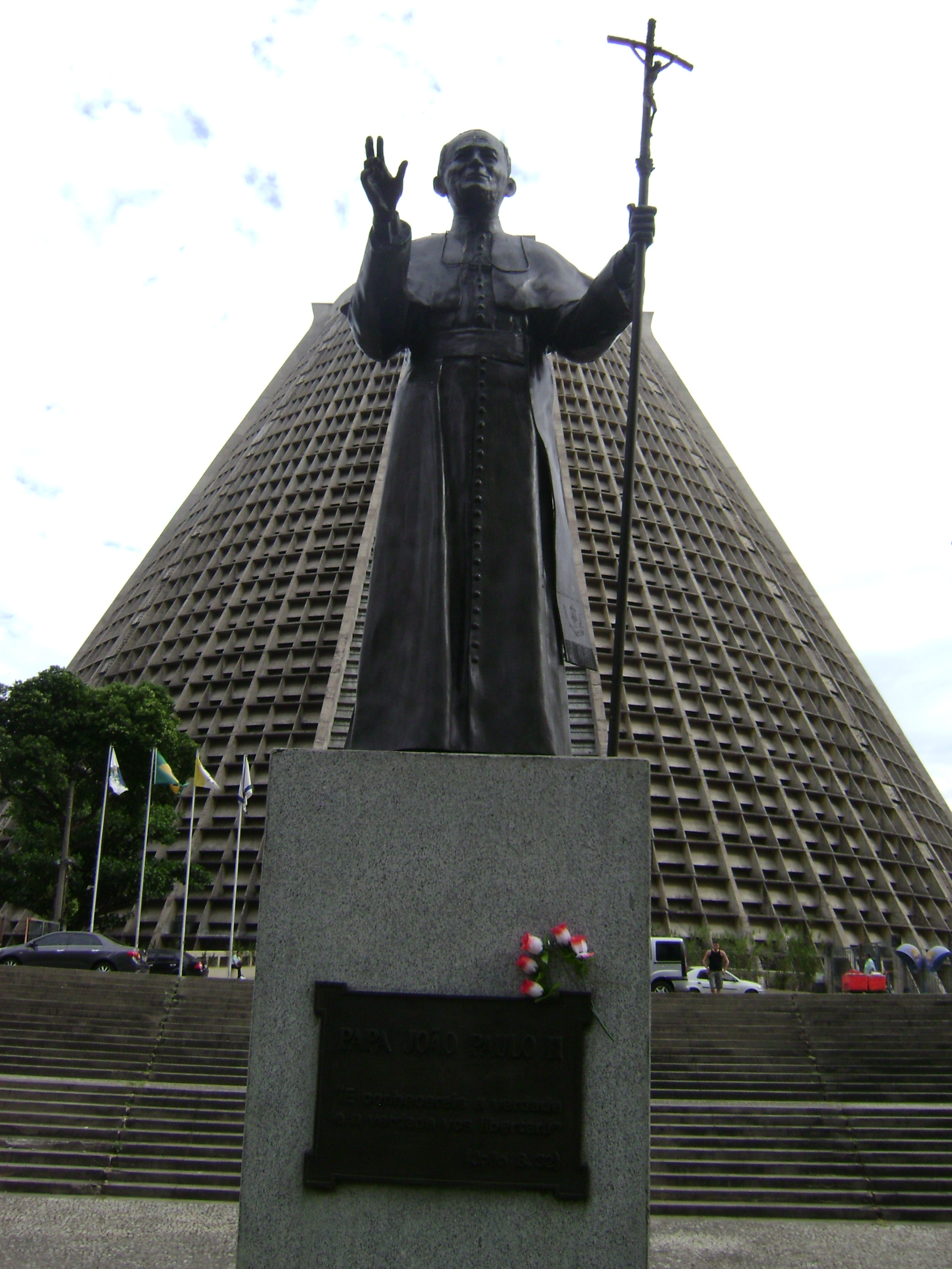 Estátua do papa João Paulo II em frente à igreja de São Sebastião, na cidade do Rio de Janeiro, Brasil.